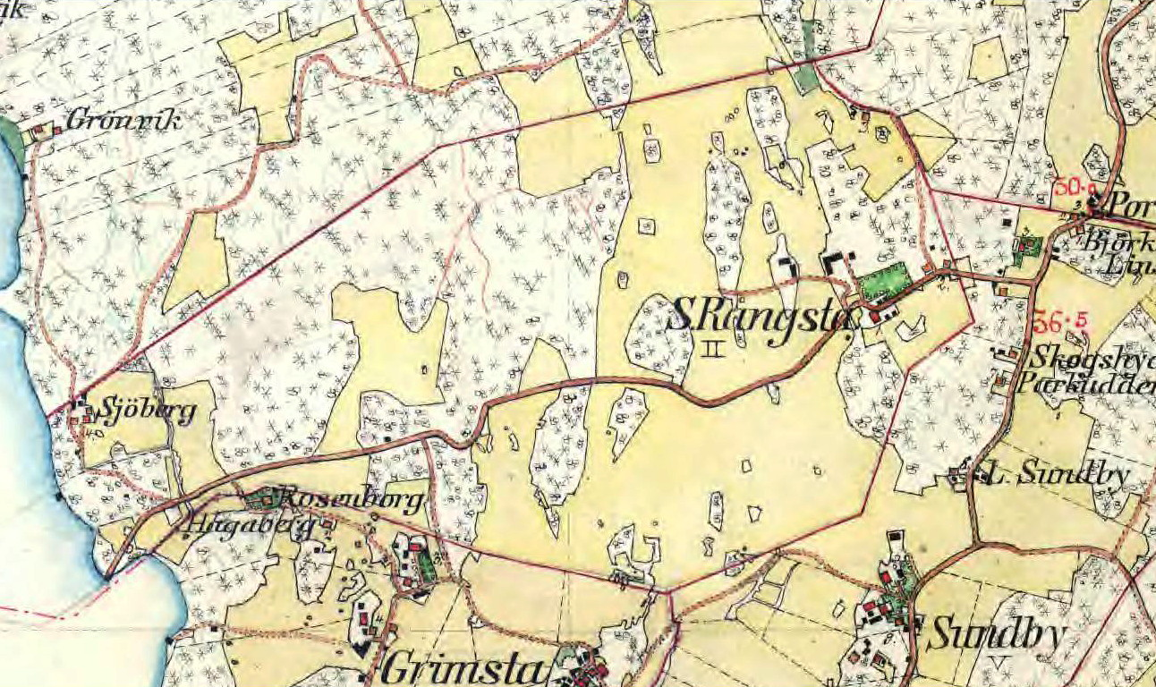 Rangsta gårds ägor